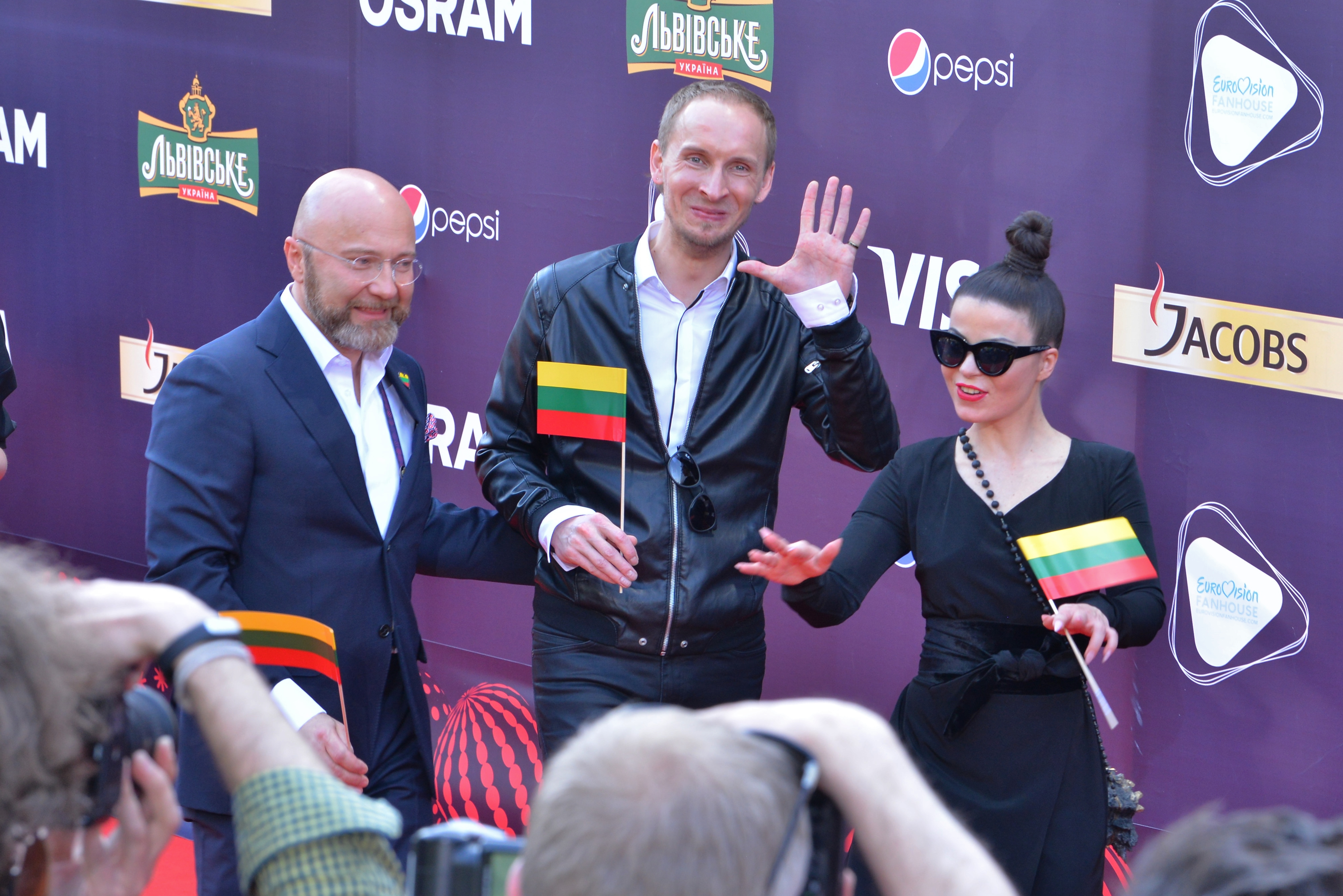 Литовська група Fusedmarc на церемонії відкриття пісенного конкурсу Євробачення 2017 у Києві